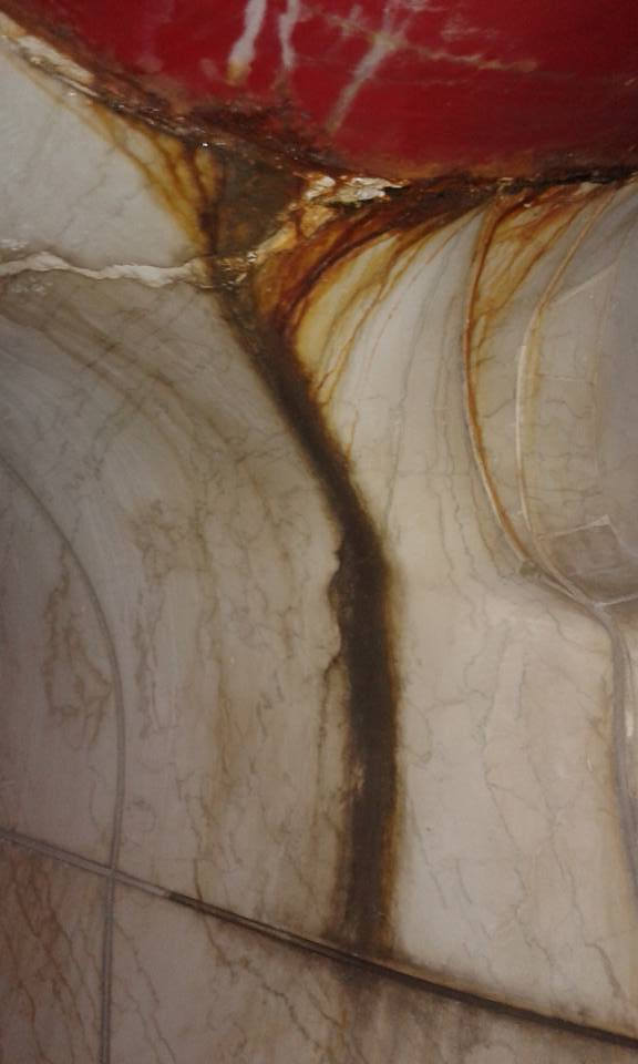 Detalle inferior del puente que muestra una de las típicas manchas de óxido y/o corrosión que suelen cubrir las obras de Calatrava.